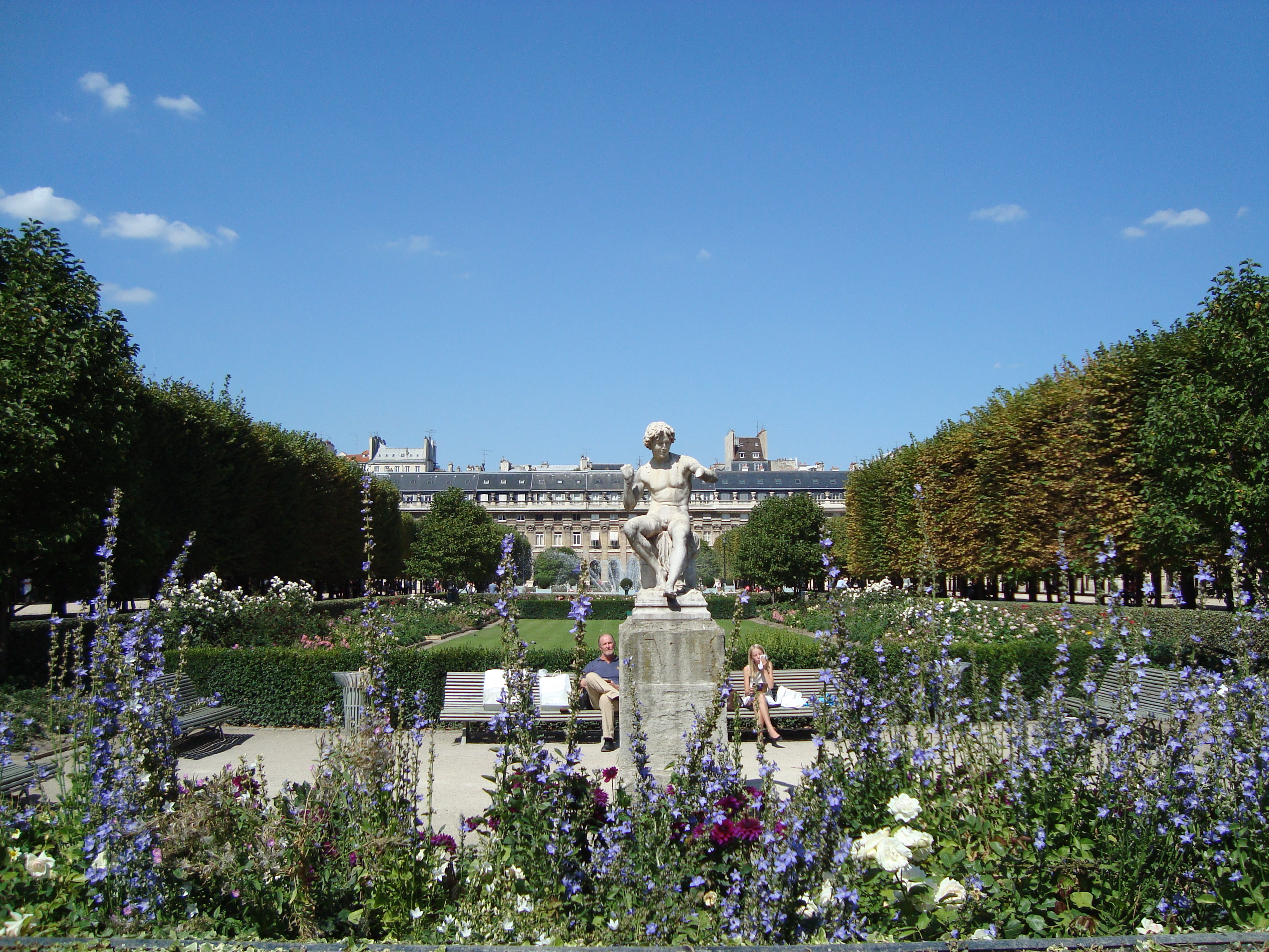 Les jardins du Palais-Royal à Paris